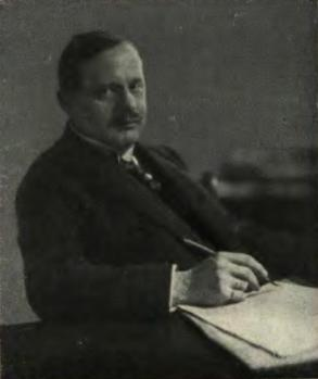 Der Oberpräsident Oberschlesiens (1923-1929) Dr. Alfons Proske